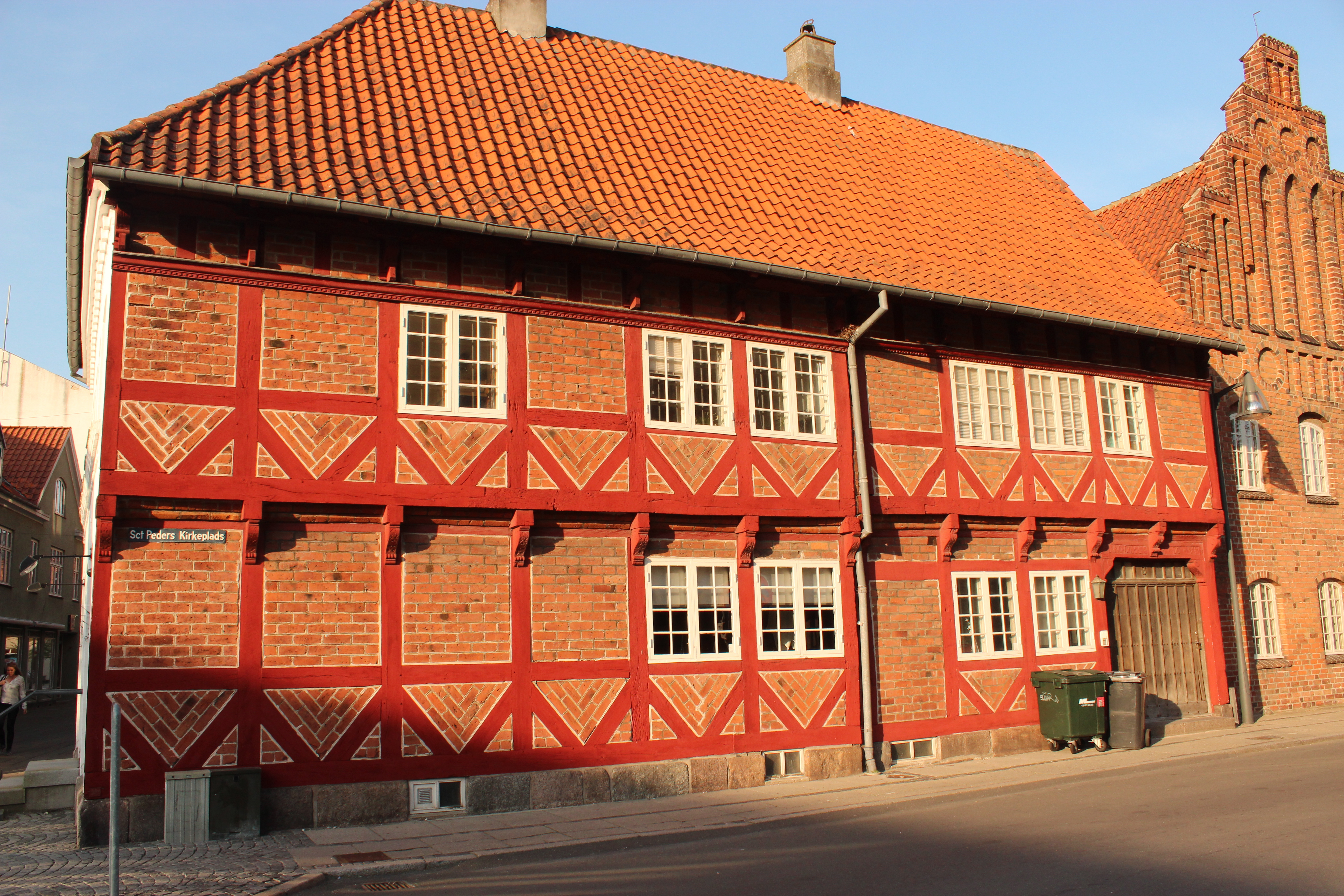 Oberst Schwanes Gård i Kirkepladsen 3 i Næstved. Opført i 1606